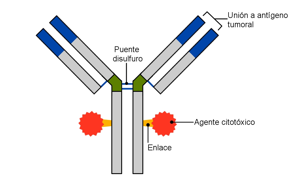 Puede observarse un anticuerpo monoclonal unido mediante enlace químico a una molécula citotoxica para formar un anticuerpo monoclonal conjugado o inmunoconjugado. Este tipo de fármacos se están empleando en el tratamiento del cáncer.